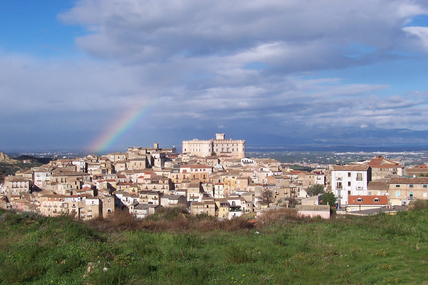 Il borgo antico di Corigliano visto dall'Ospedale, Italy